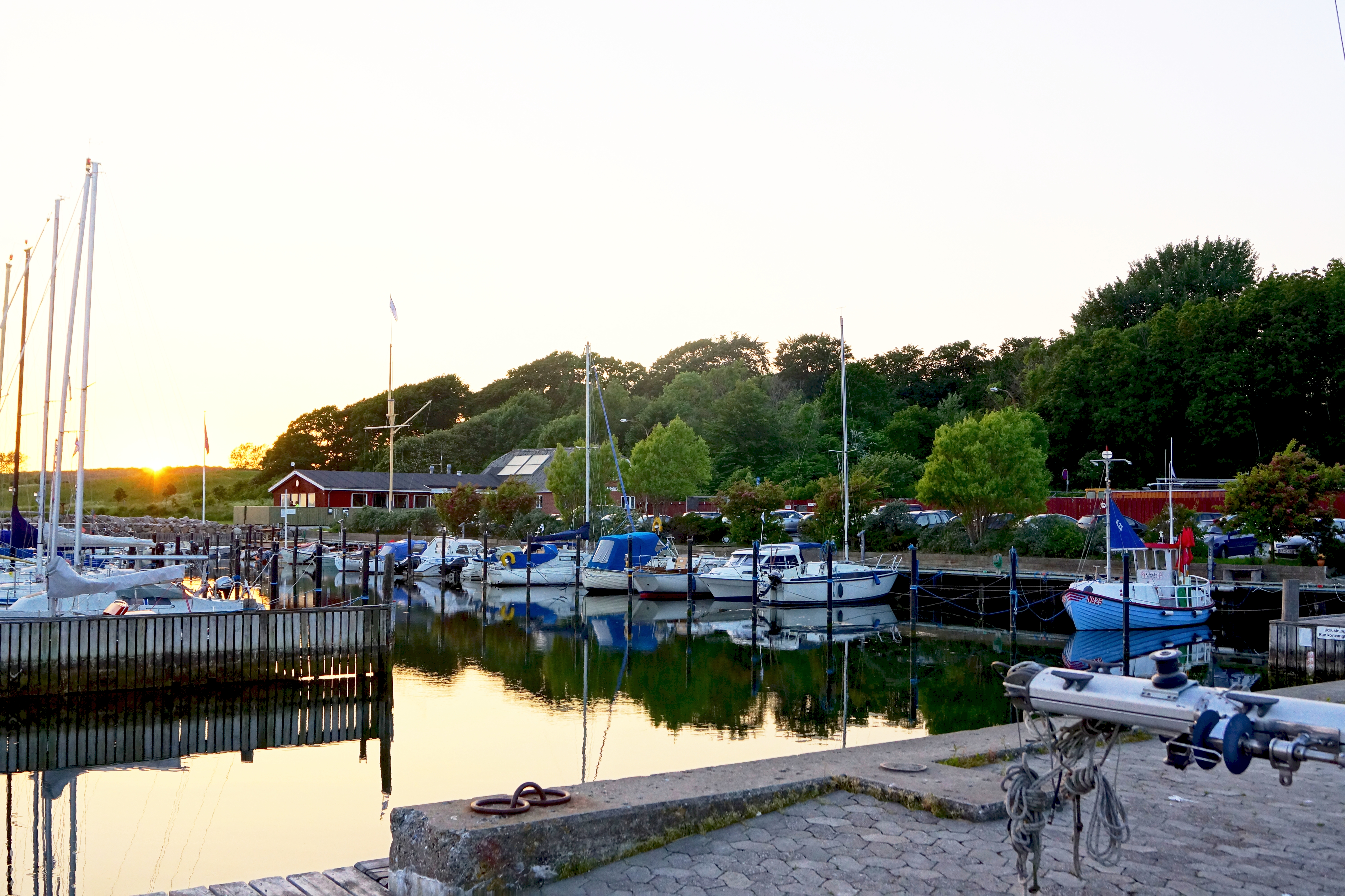 Egens Vig, Nappedam Lystbådehavn